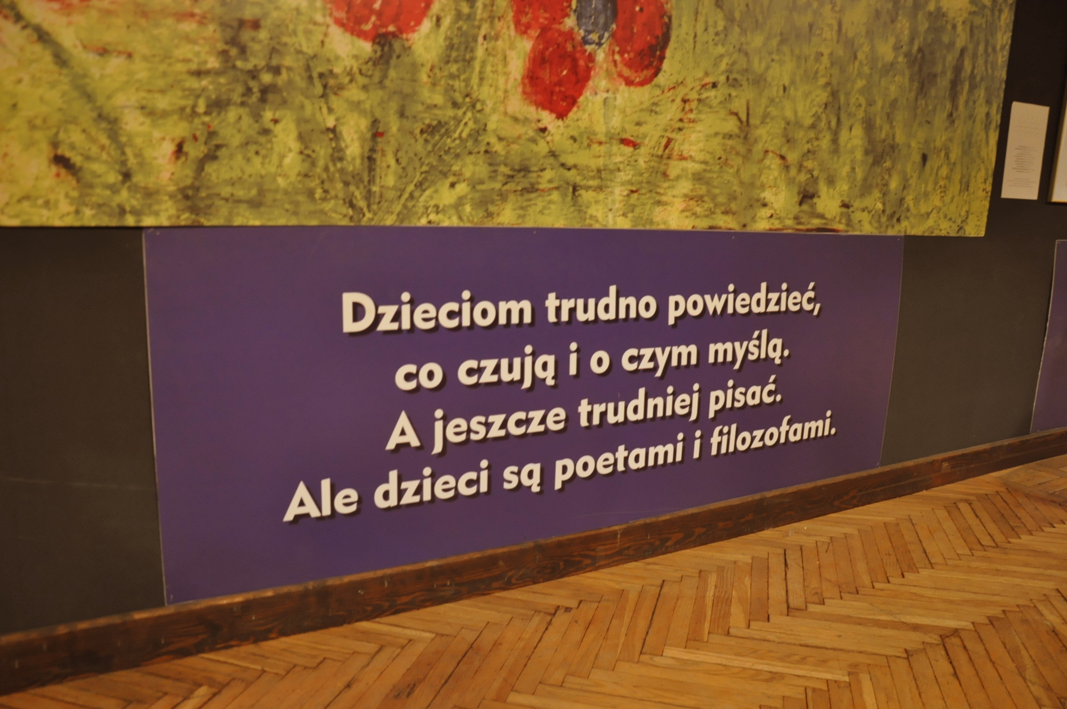 Wystawa na III Warszawskich Targach Książki poświęcona Januszowi Korczakowi